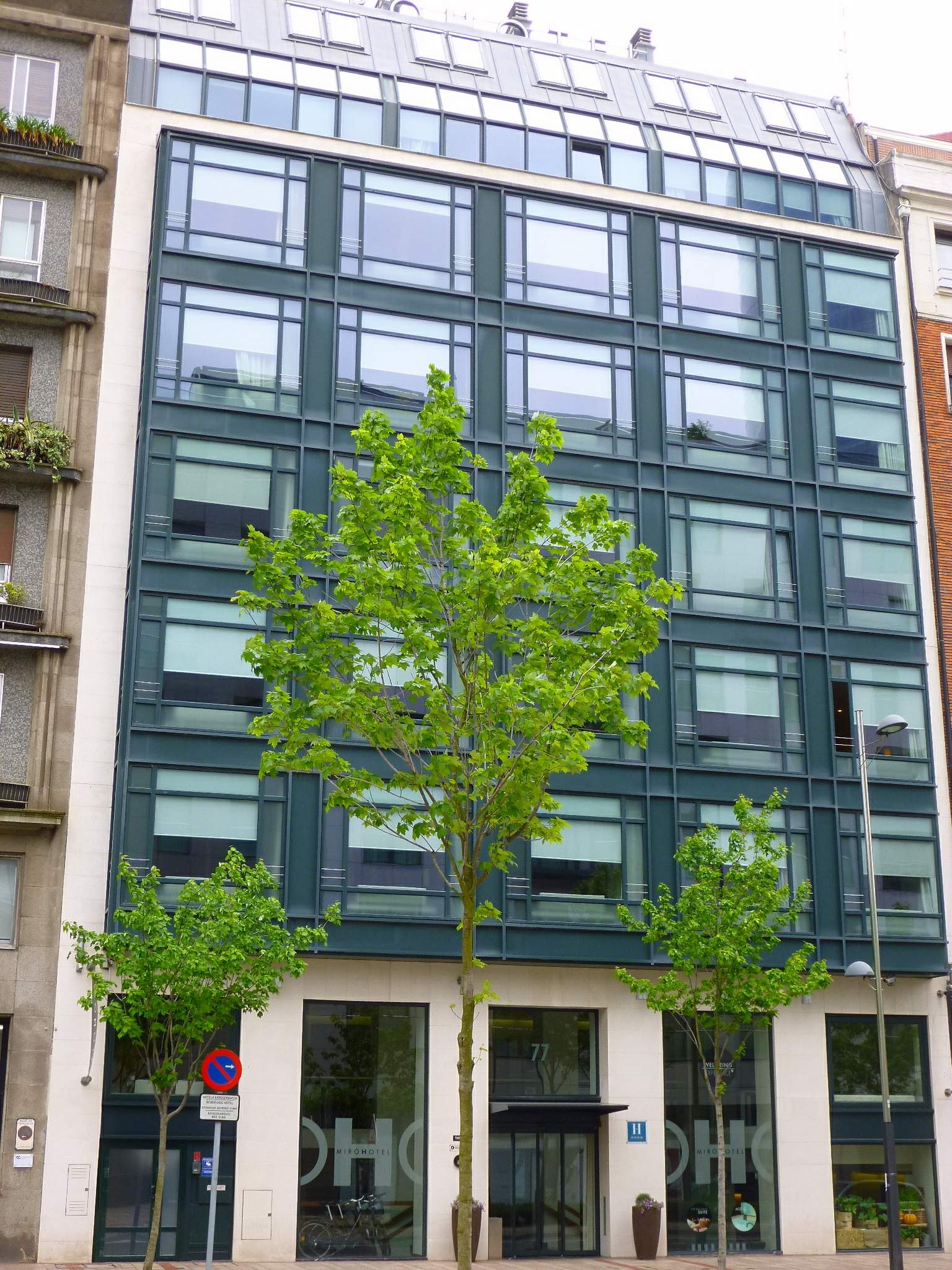 Hotel Miró (Bilbao).